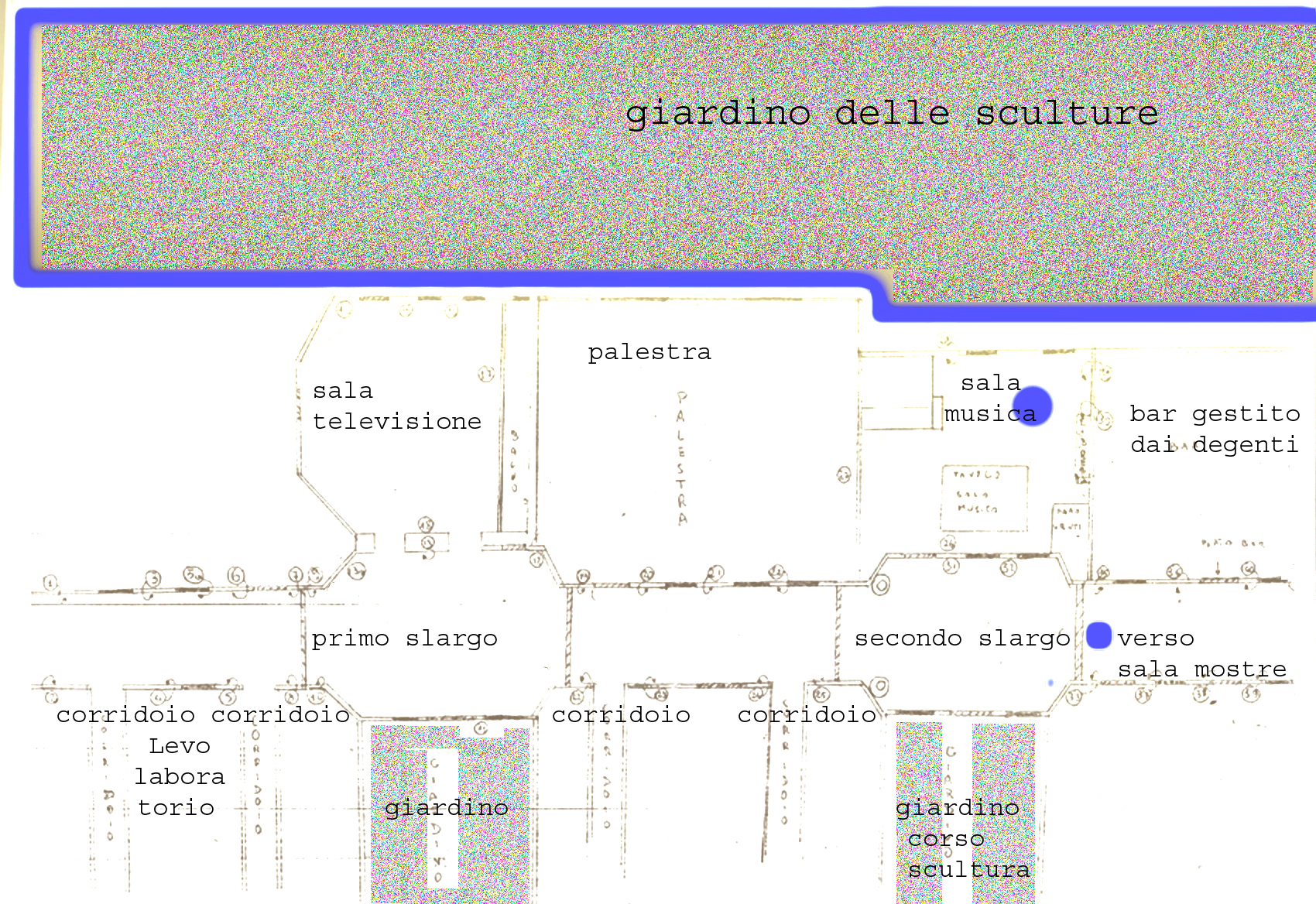 Pianta del Museattivo Claudio Costa. Le parti colorate sono i giardini che circondano l'edificio. I cerchietti piccoli sono numerati e servono a costruire una mappa collegata ai lavori approssimativamente posizionati dove è il cerchietto i due tondi blu sono uno indicante il tavolo delle riunioni cioè quello più grande nella "sala Musica" l'altro più in basso indica il portone di passaggio per il corridoio che portava al bar gestito dai pazienti ed alla sala mostre sulla sinistra proseguendo dalle quale sempre sulla sinistra si usciva nel giardino delle sculture, il secondo giardino più piccolo in basso è quello dove si tenavano i corsi di scultura mentre il "Giardino delle Sculture" con le opere peramnentemete in mostra è rapresentato dalla fascia colorata al di sopra della mappa di interno.Adesso tutto il museo e'spostato in uno degli edifici del complesso terapeutico casa Michelini mentre il Giardino delle Sculture è stato riposizionato nei giardini di tale complesso.